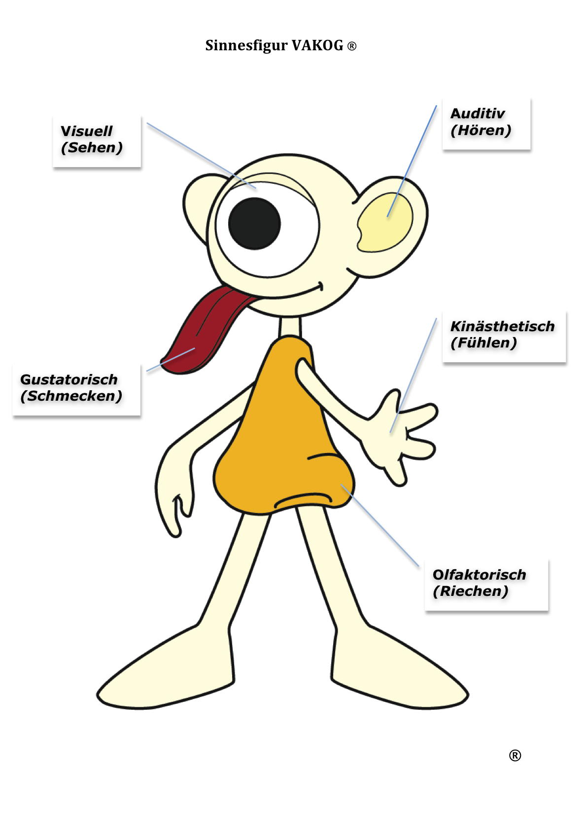 Sinnesfigur VAKOG© V-A-K-O-G ist die Abkürzung für die 5 Sinne: Visuell, Auditiv, Kinästhetisch, Olfaktorisch und Gustatorisch. Worte, die diese 5 Sinne beschreiben (wie z.B. Jetzt "sehe" ich vielleicht "deutlicher" = Visuell.) werden benutzt, um in der Kommunikation gezielt den Sinneskanal (der Sinneskanal, indem jemand überwiegend Dinge speichert) anzusprechen. Es ist möglich zu sehen, in welchem Sinneskanal sich jemand gerade befindet, indem die Augenbewegungsmuster genutzt werden. VAKOG ist bei richtiger Anwendung sehr erfolgreich um Trancezustände einzuleiten oder Entspannungsmomente zu fördern. Das "kleine Glücklichmachbuch" ist im September 2015 im Buchhandel erschienen und gibt Kindern, sowie dem Vorleser die Möglichkeit gemeinsam die Sinneseindrücke abzurufen. Ein Erlebnis im Jetzt zu sein und damit sehr beieinander. Dieses Buch ist ein neues Genre und der Auftakt zu einer Buchreihe.